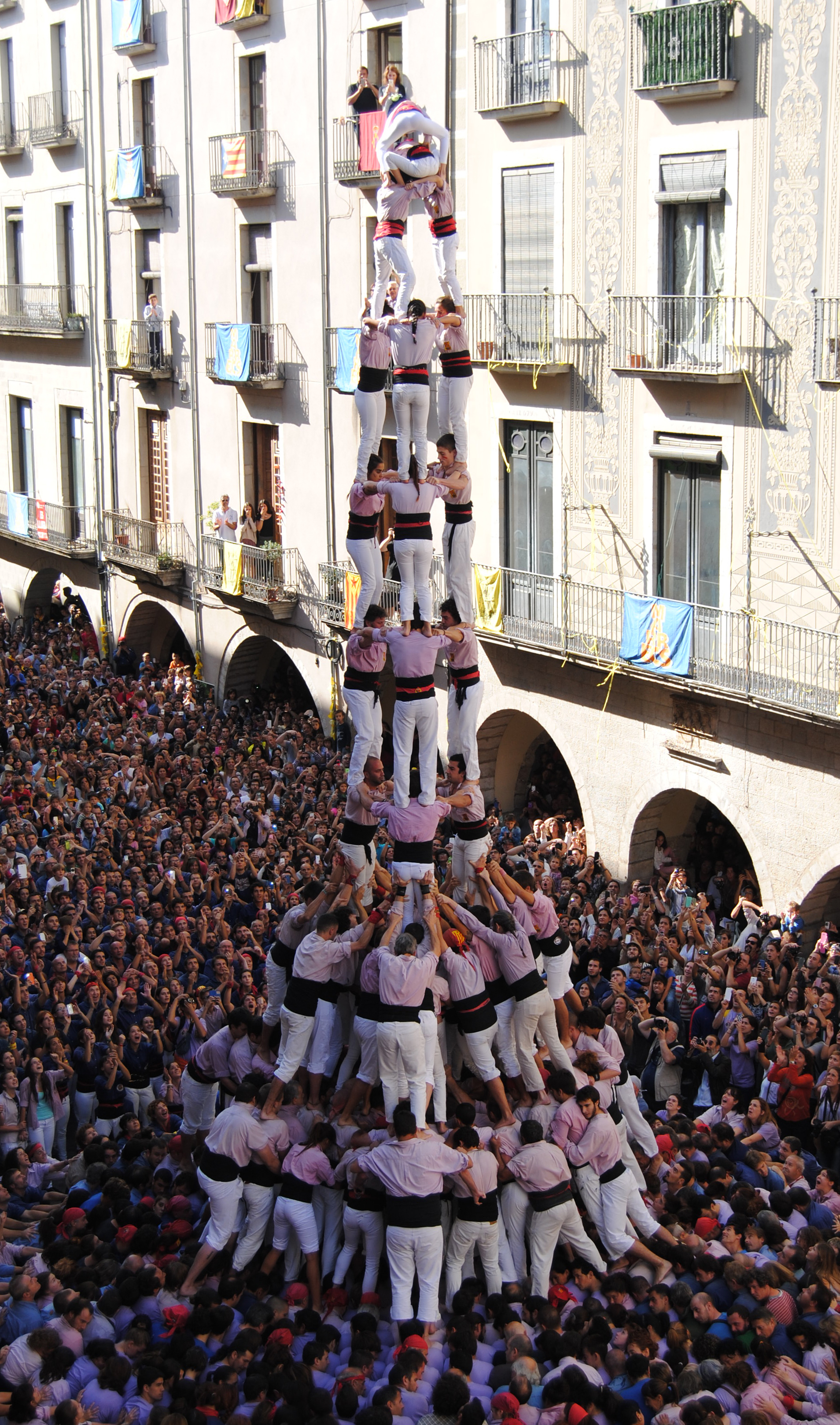 3 de 10 amb folre i manilles dels Minyons de Terrassa a plaça del Vi per la diada de Sant Narcís del 2014. Tercer 3de10fm descarregat per la colla i cinquè de la història.